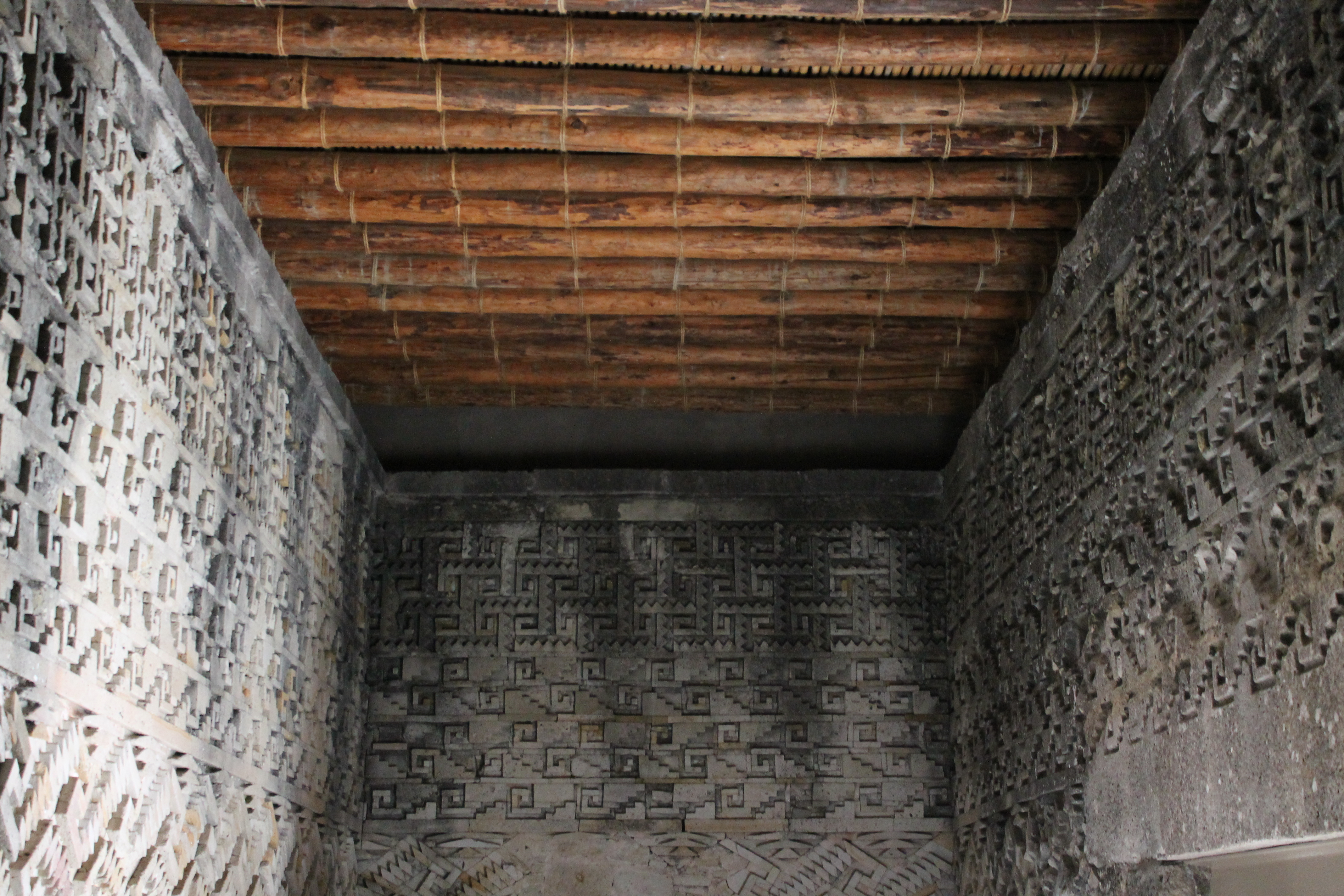 Se muestra el techo y parte superior de una de las habitaciones del Palacio ubicado en el Grupo de las Columnas. La parte superior de los muros está ornamentada por grecas. El techo es reconstruido con bases arqueológicas que dan una idea del ambiente original.